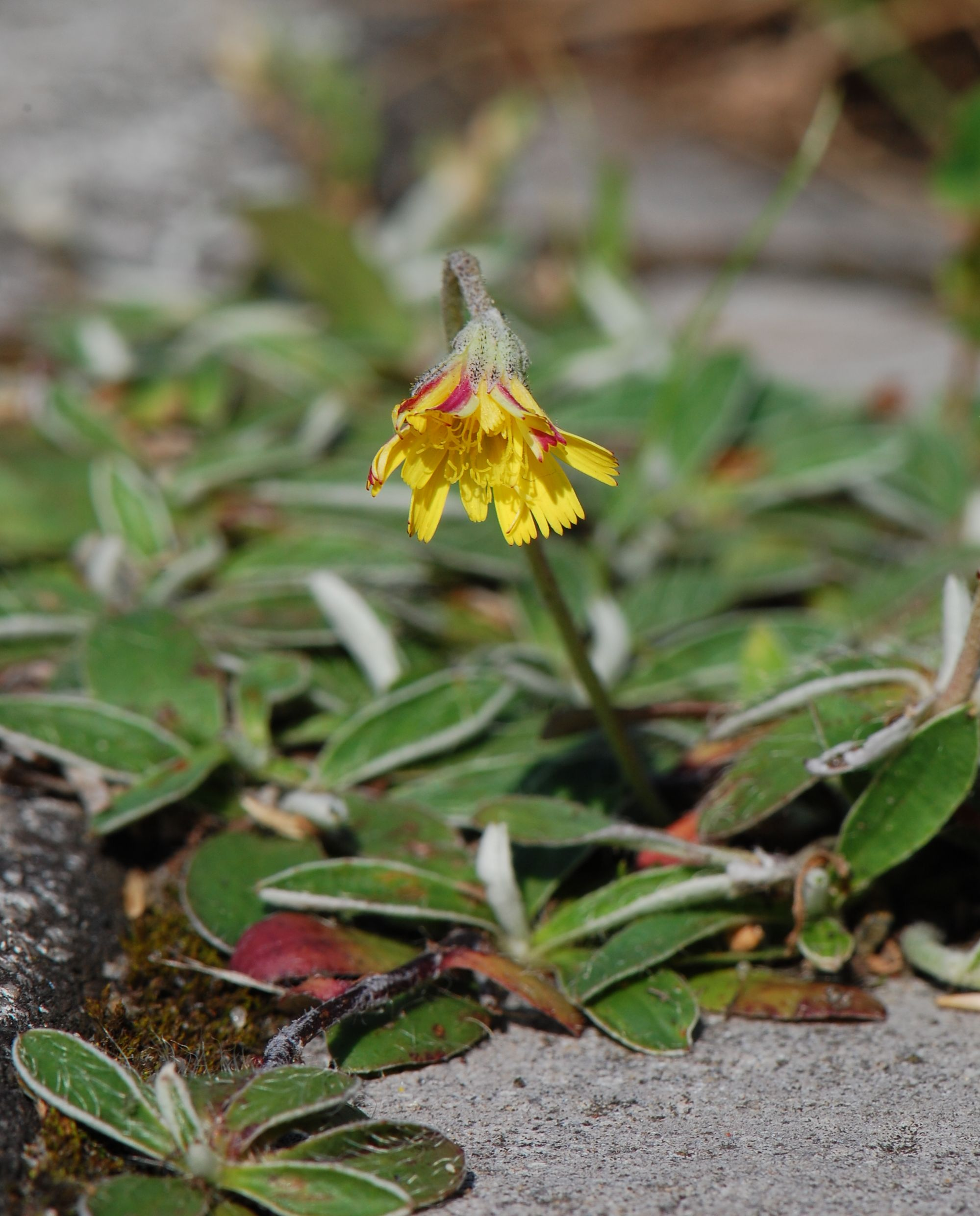 Hieracium pilosella, Berlin, Bezirk Mitte, Standort im Pflaster neben einer Straße